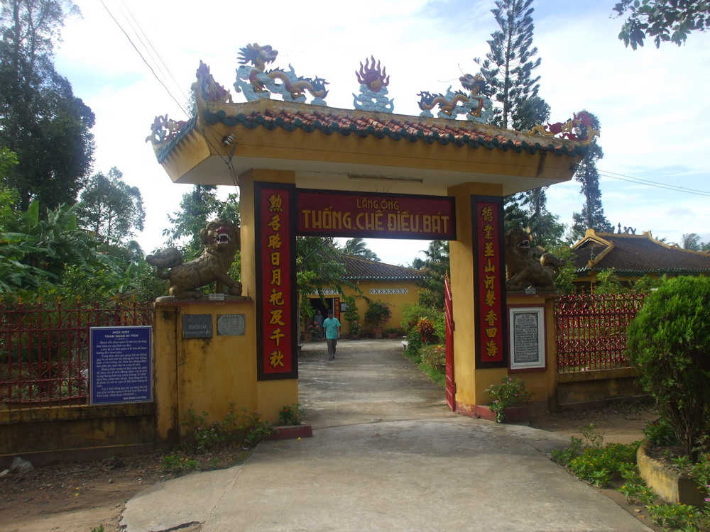 Khu lăng Thống Chế Điều Bát tại Trà Ôn, Vĩnh Long, Việt Nam.